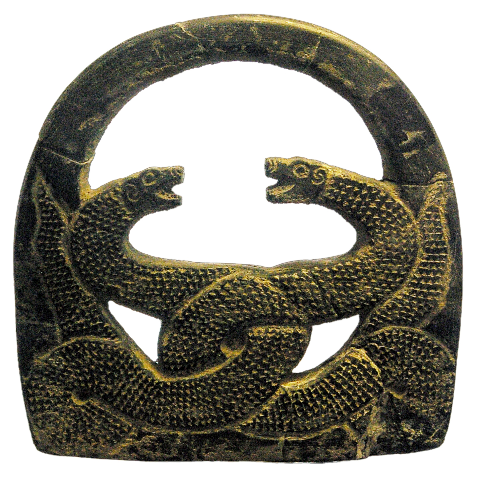 Azerbaijan Museum, Tabriz (Iran). Rock weight, Jiroft, 3rd mil. BC Azerbaijan Museum in Tabriz, Iran